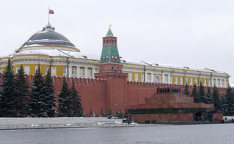 Red Square: Senate, Mausoleum